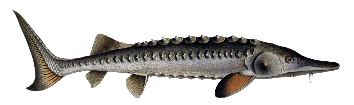 Acipenser sturio